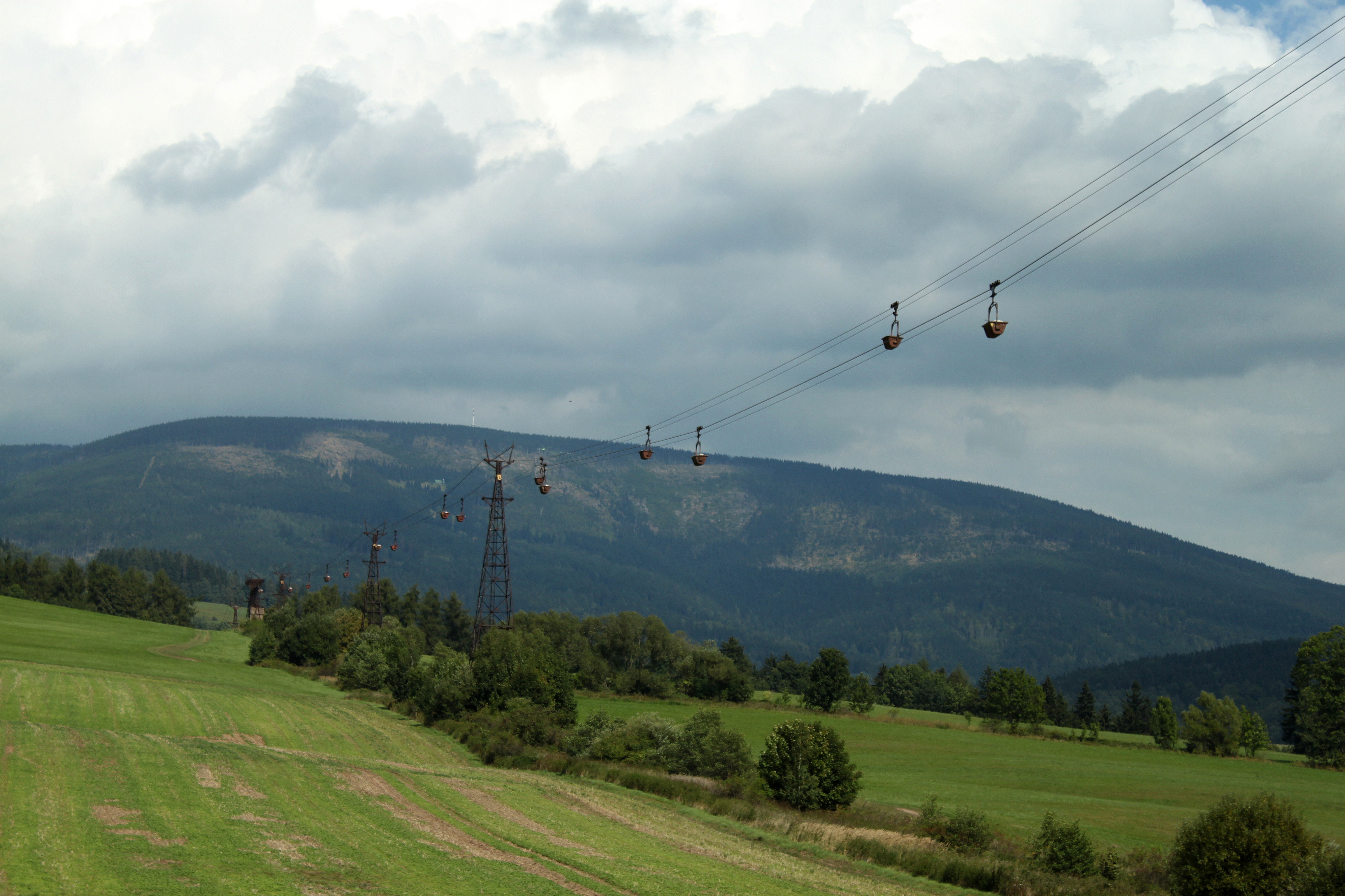 Lánov - Kovársko, pohled na Černou Horu; nákladní lanovka Černý Důl - Kunčice n. L.